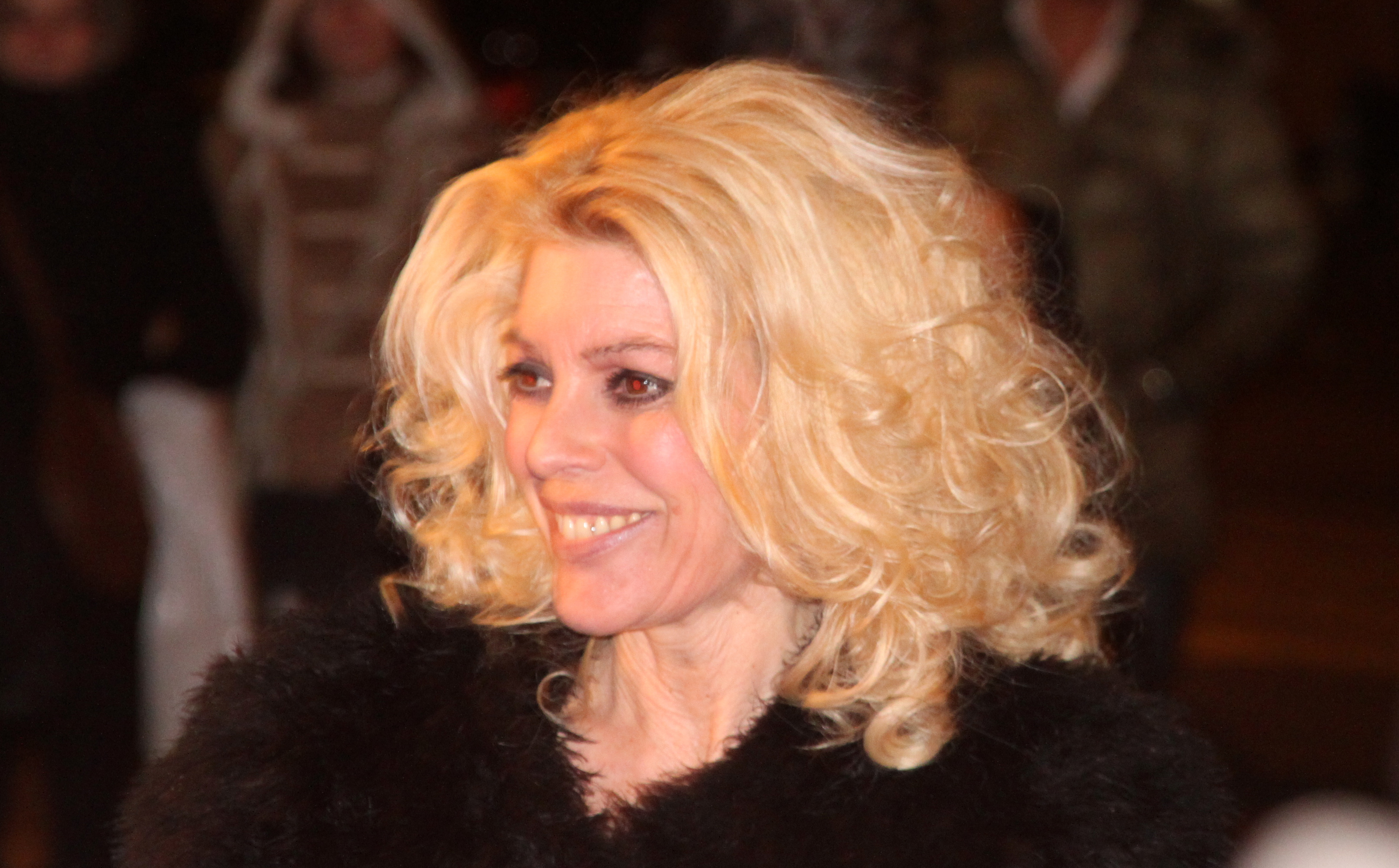 Judith Osborn.